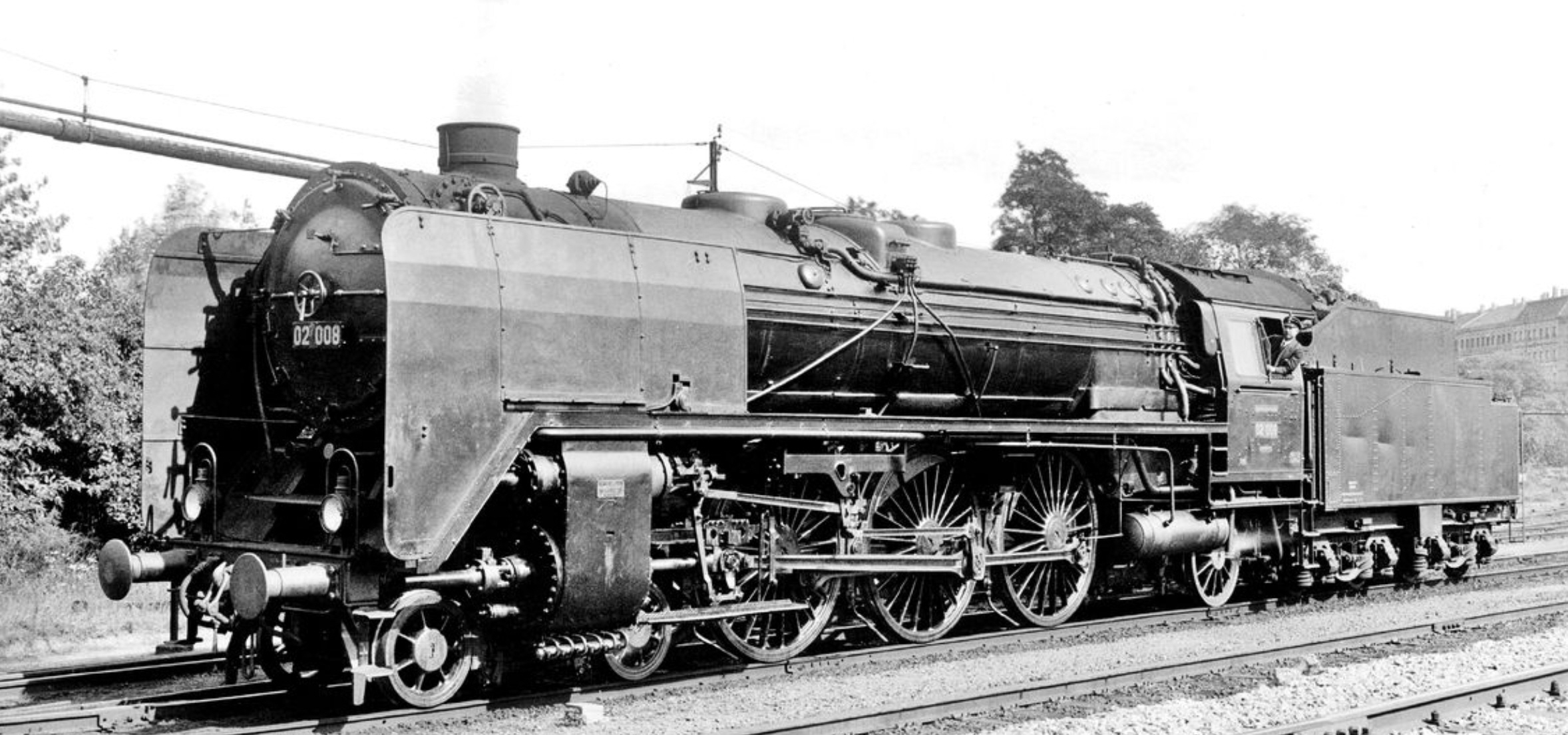 Lokomotive der DR-Baureihe 02